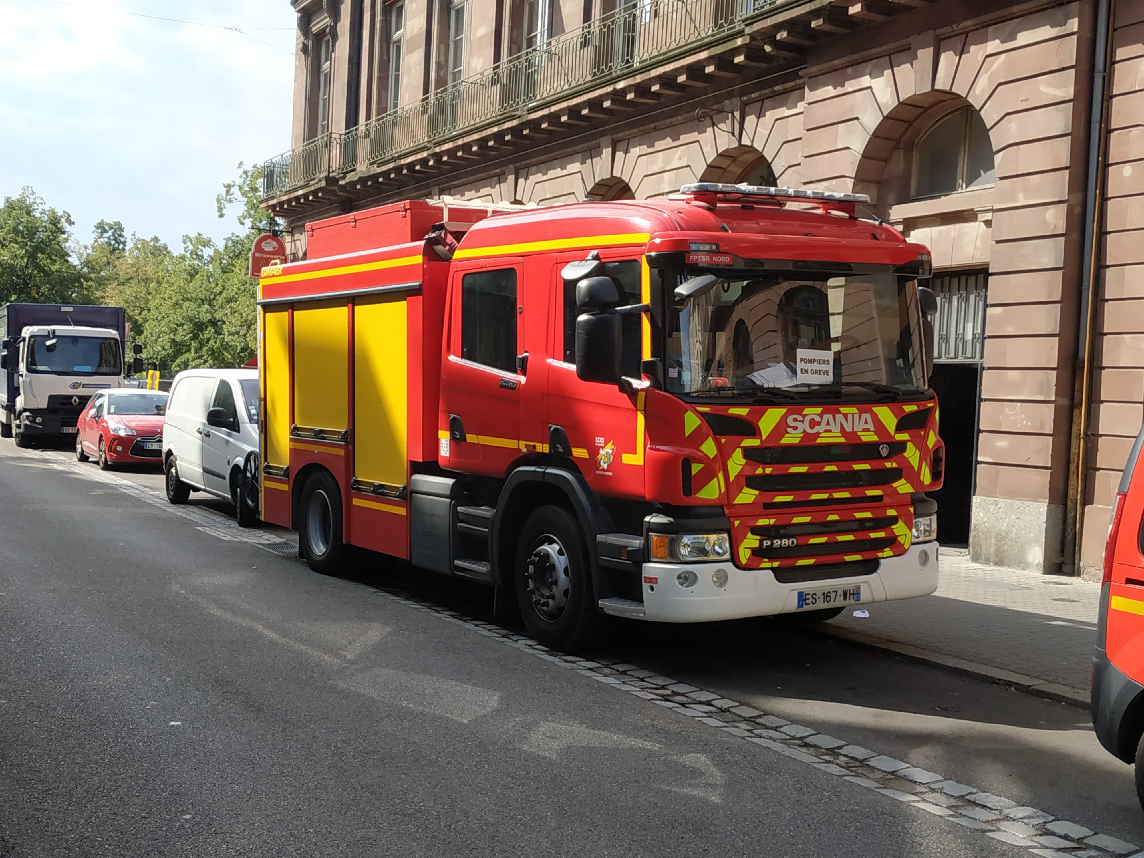 Fourgon pompe tonne secours routier (FPTSR) des sapeurs-pompiers SDIS 67, suite à l'incendie d'un appartement Rue de la Brigade Alsace-Lorraine à Strasbourg, en août 2019